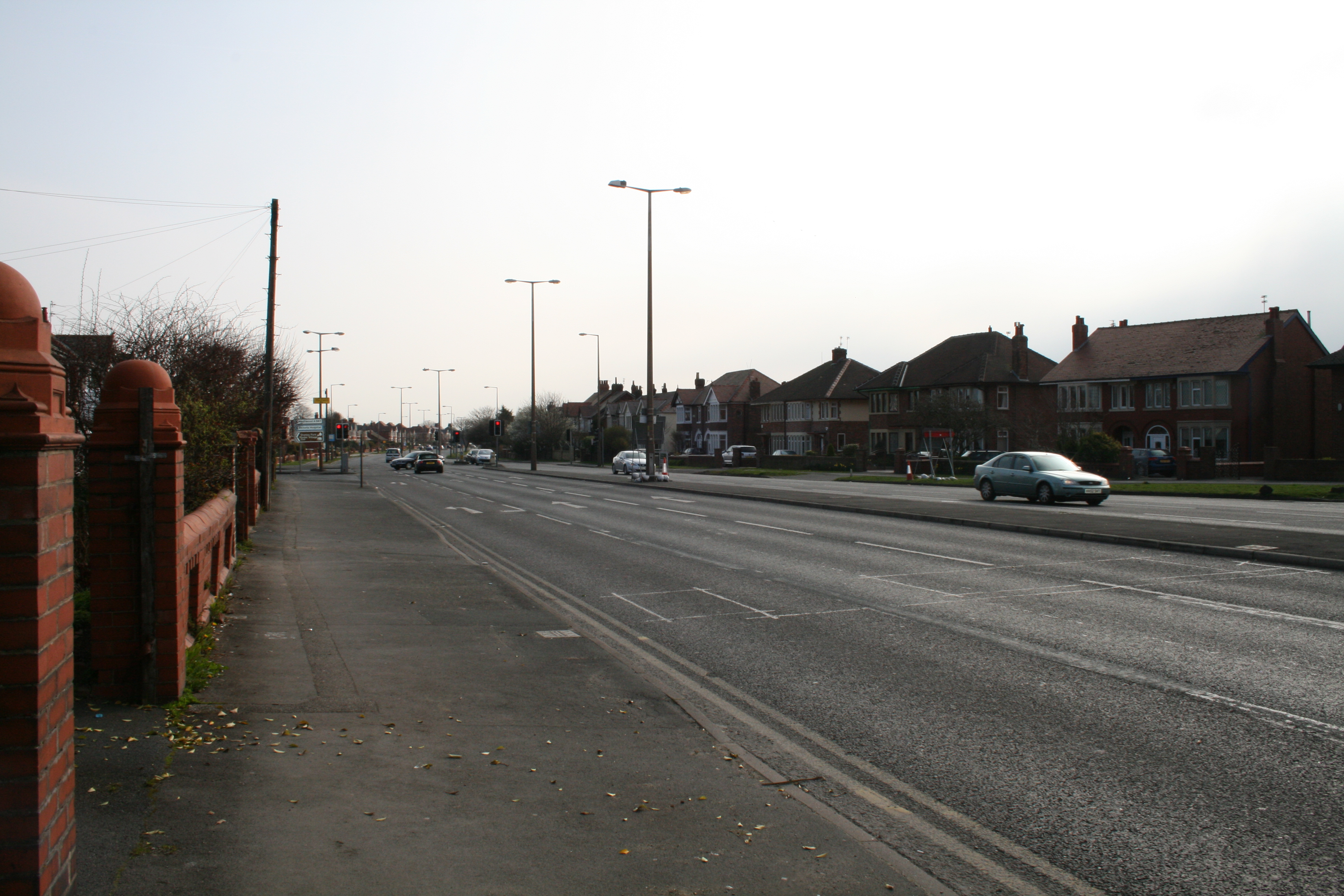 Silnice na Britských ostrovech